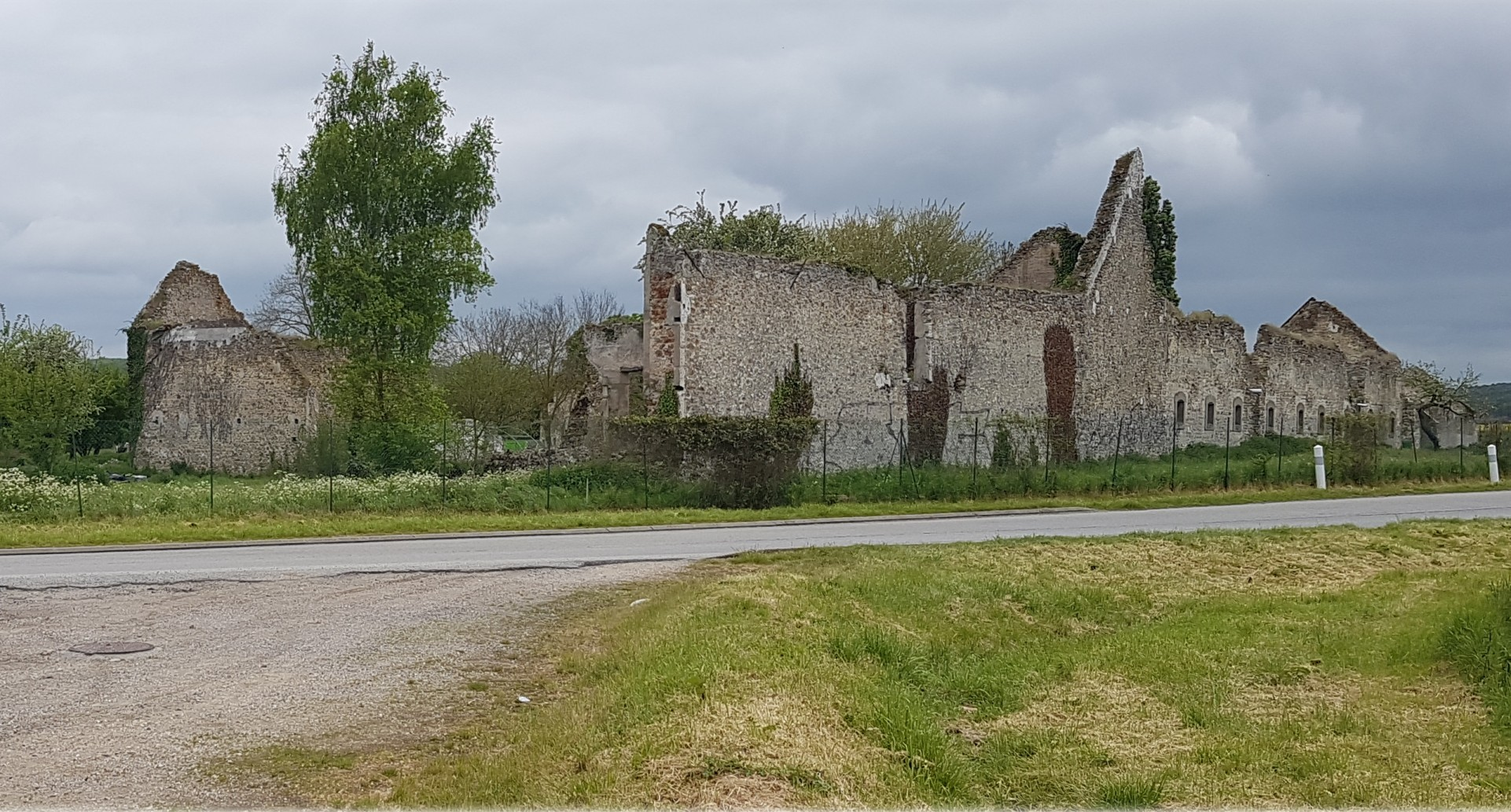 Site archéologique et de restauration du Patrimoine de la ville gallo-romaine de Diodurum et de la grange cistercienne d'Ithe